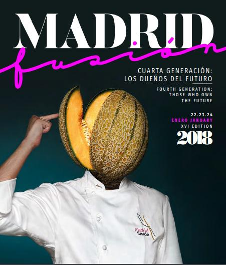 Mañana lunes, 22 de enero, arranca en el Palacio Municipal de Congresos de Madrid la XVI edición de Reale Seguros Madrid Fusión, el congreso internacional de gastronomía más reconocido del mundo. Durante tres días, un centenar de chefs desvelarán las técnicas más innovadoras de la alta cocina y se desarrollarán 60 demostraciones, 24 talleres formativos y 15 concursos, subastas y premios.